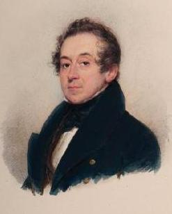 kolorierte Bleistiftzeichnung (16,0 × 12,5 cm) von: Josef von Sedlnitzky (1778–1855), österreichischer Hofbeamter